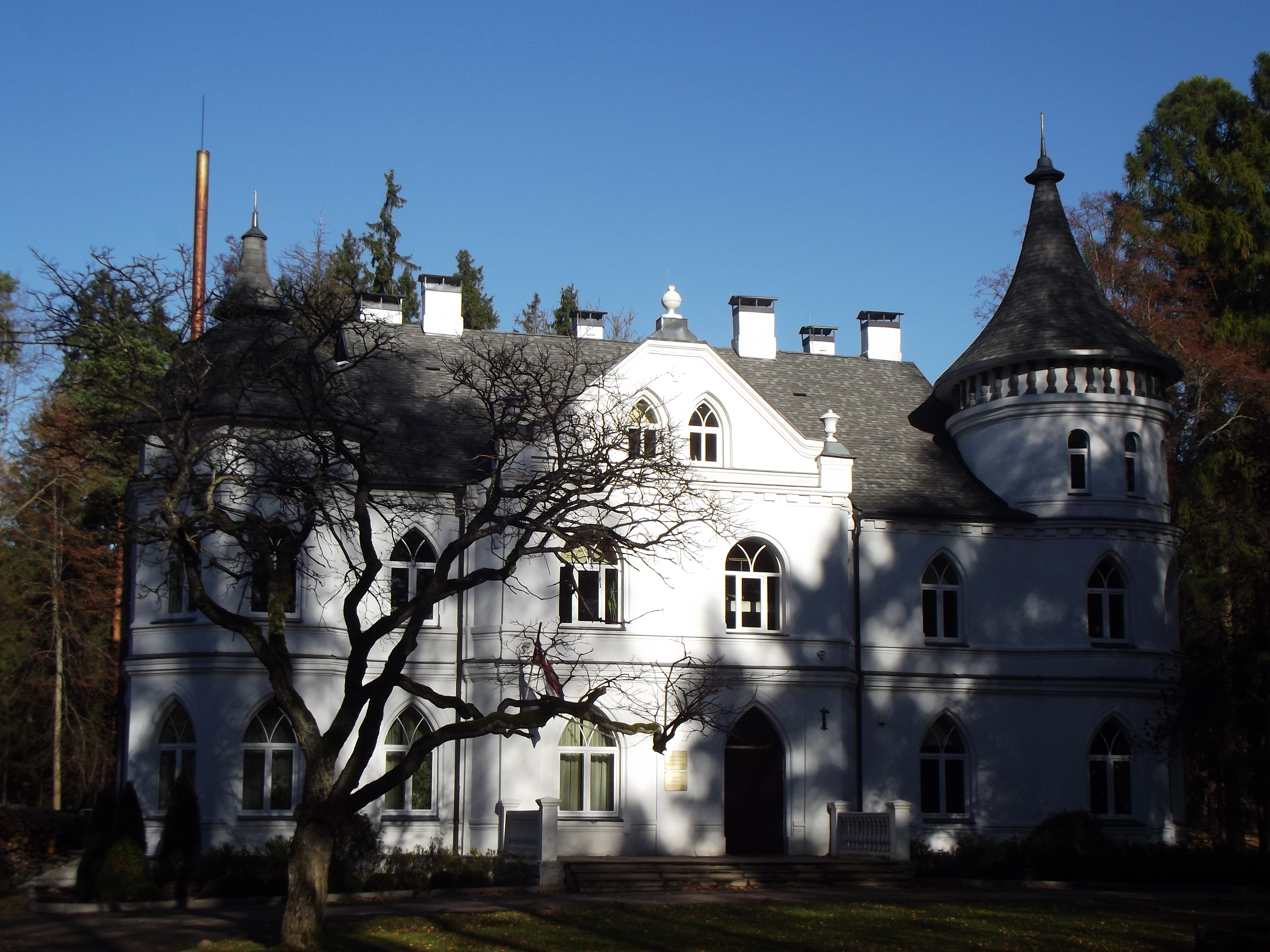 Baldones Baltā pils